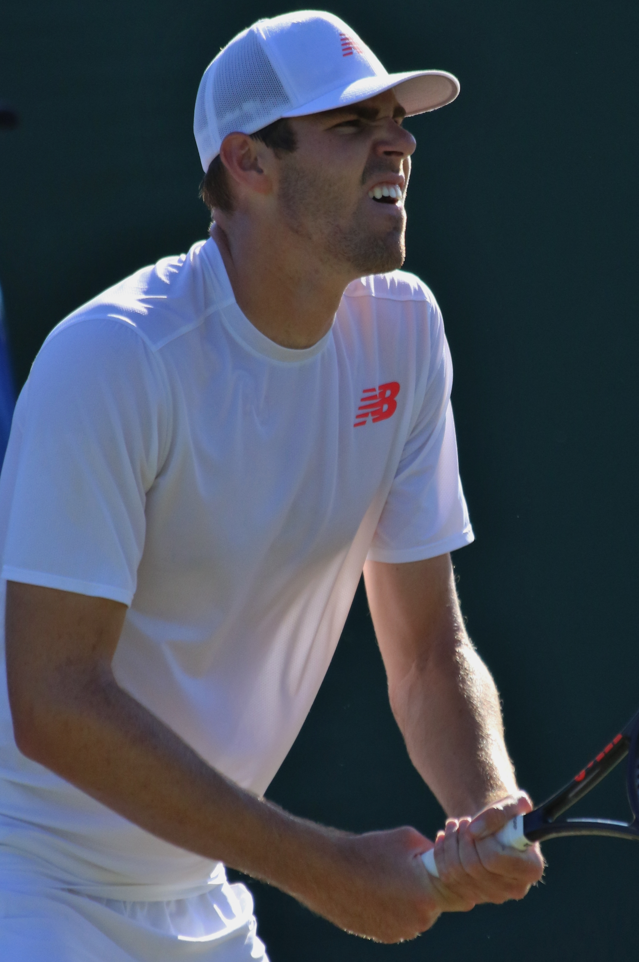 Opelka WMQ18 (7)